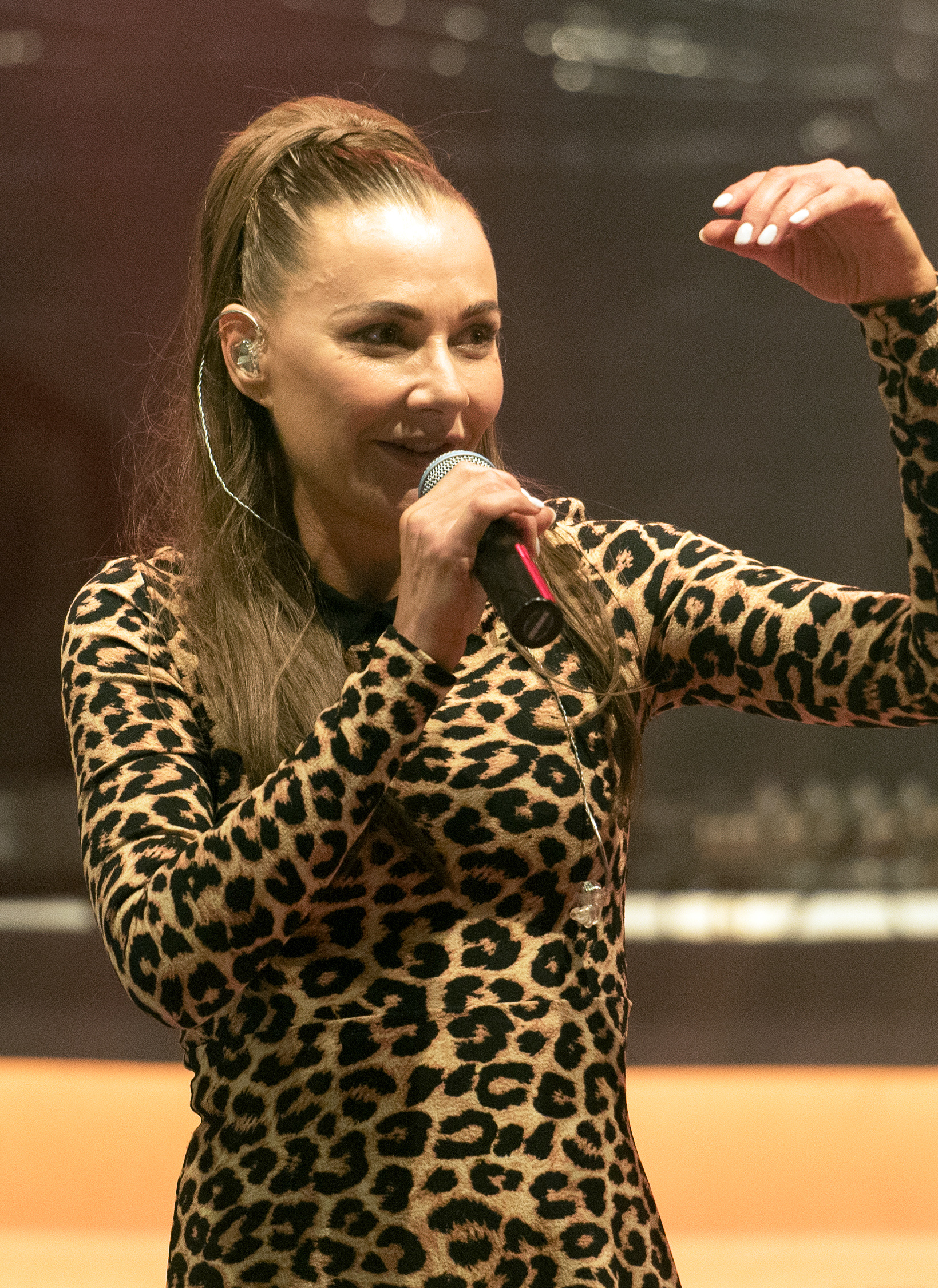 Whigfield beim Alstervergnügen 2016